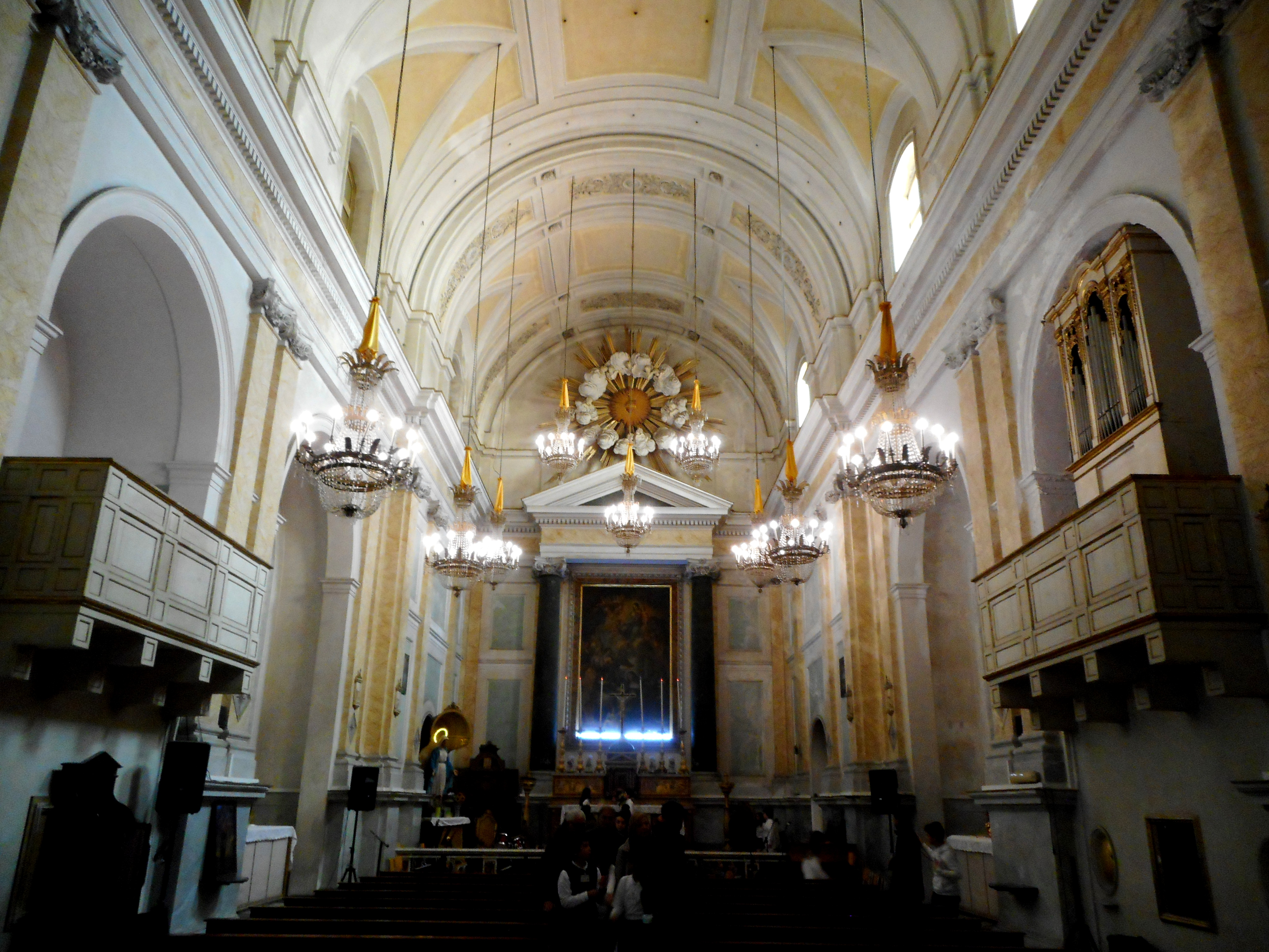 Interno della chiesa di San Francesco di Sales nell'Educandato Maria Adelaide